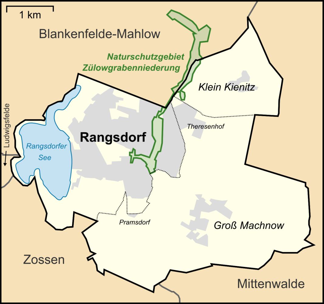 Karte des Naturschutzgebietes Zülowgrabenniederung